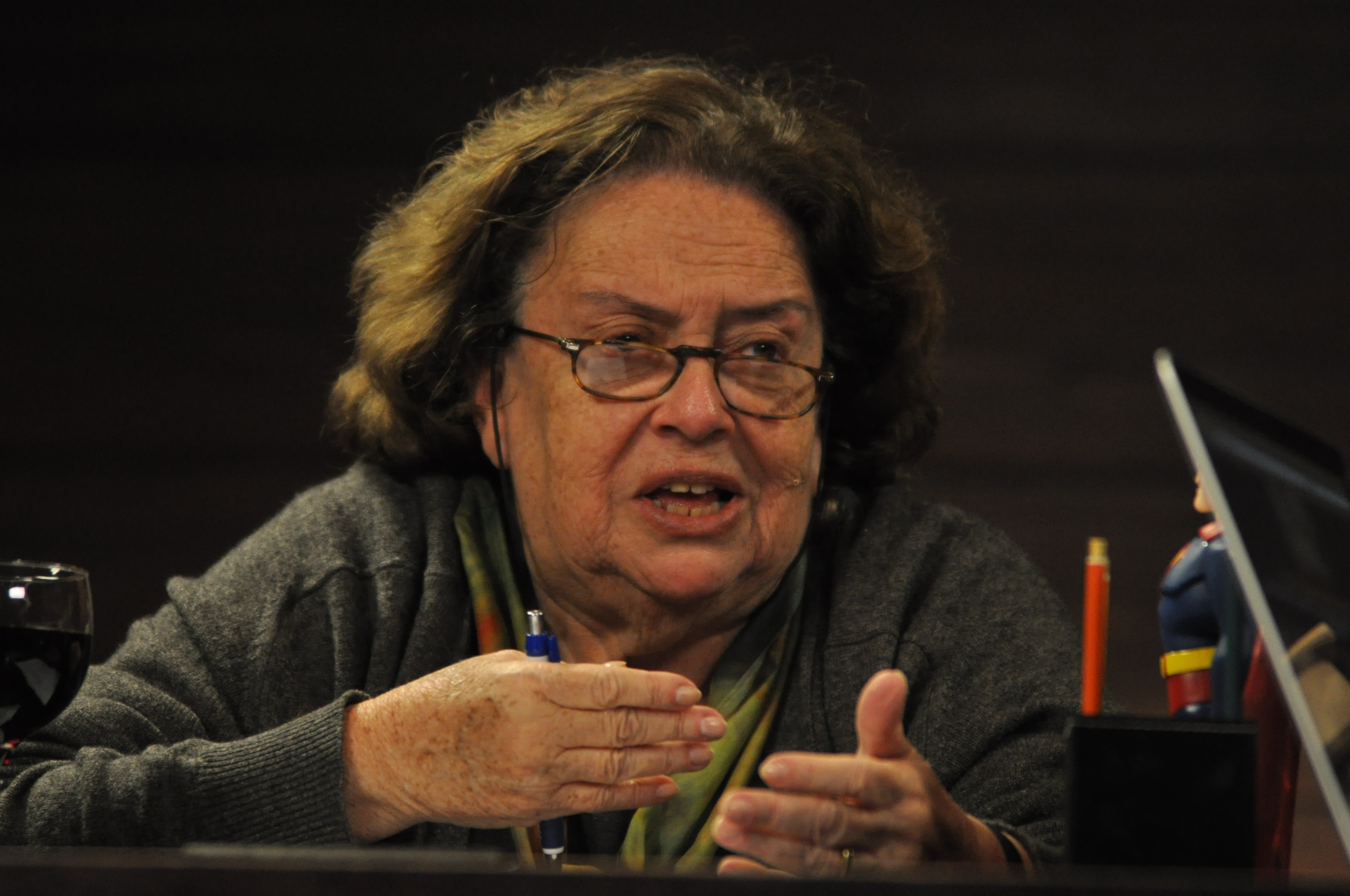 Café Filosófico com Anna Verônica Mautner em Campinas 21/08/09 Foto: Rodrigo Cancela